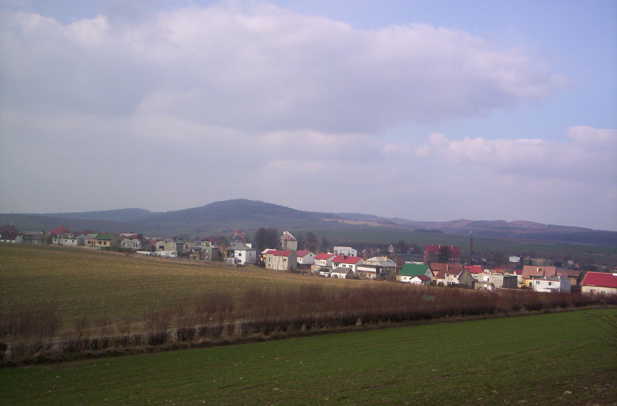 Fot.: Bartosz Senderek